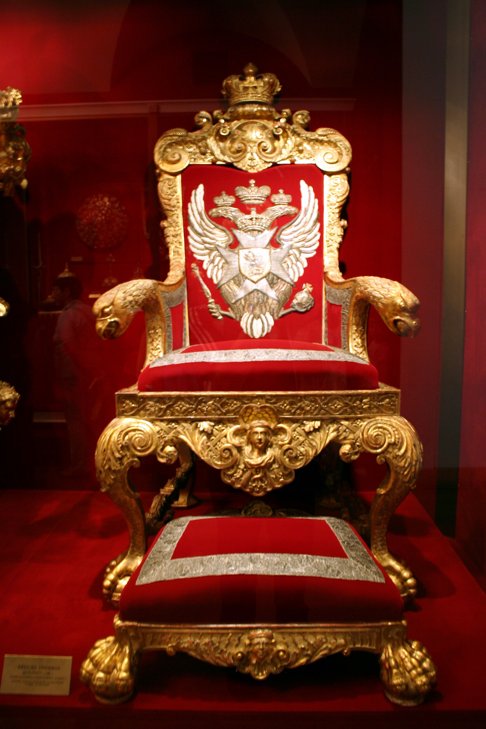 Museo de la Armería estatal, Oruzheynaya palata, en el Kremlin. Trono